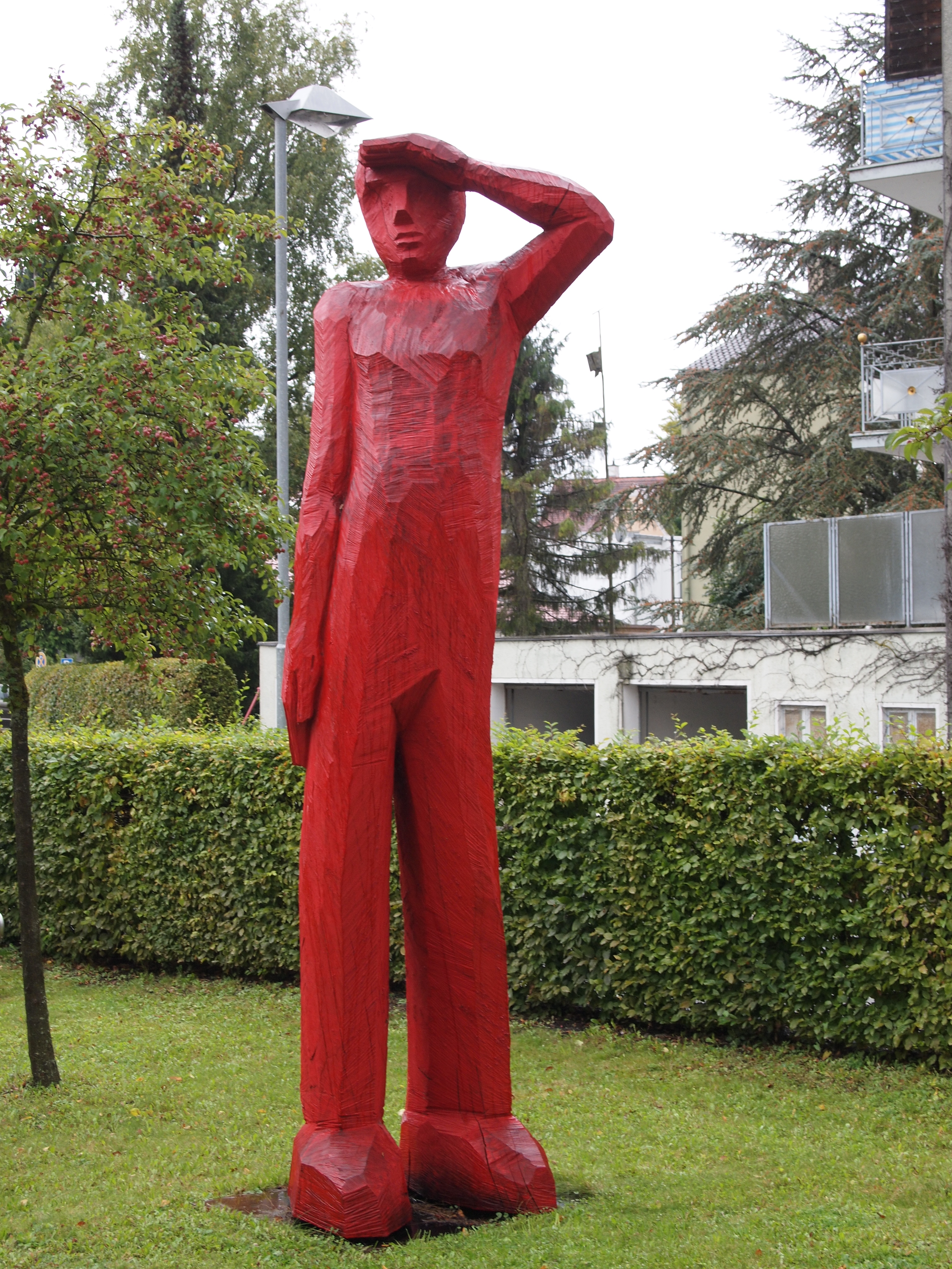 Katharinenstraße 1; Rote Holzskulptur "Licca-Mann" von Josef Lang im Garten des Neuen Rathauses Landsberg am Lech